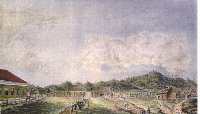 Художник Н.А. Бестужев (1791-1855). Место создания - Читинский острог, Забайкалье. 1828 г. Акварель